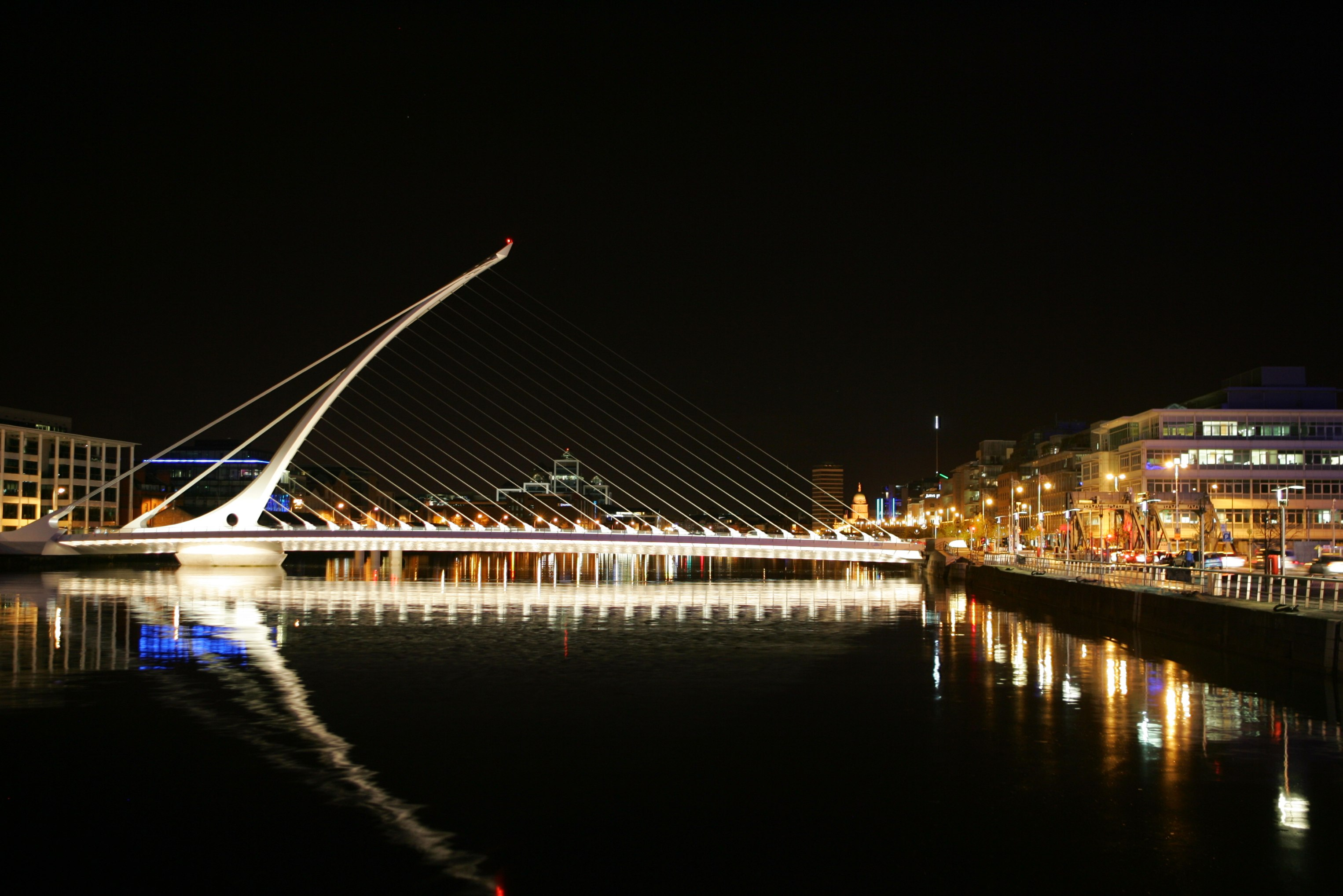 Samuel Beckett bridge at night